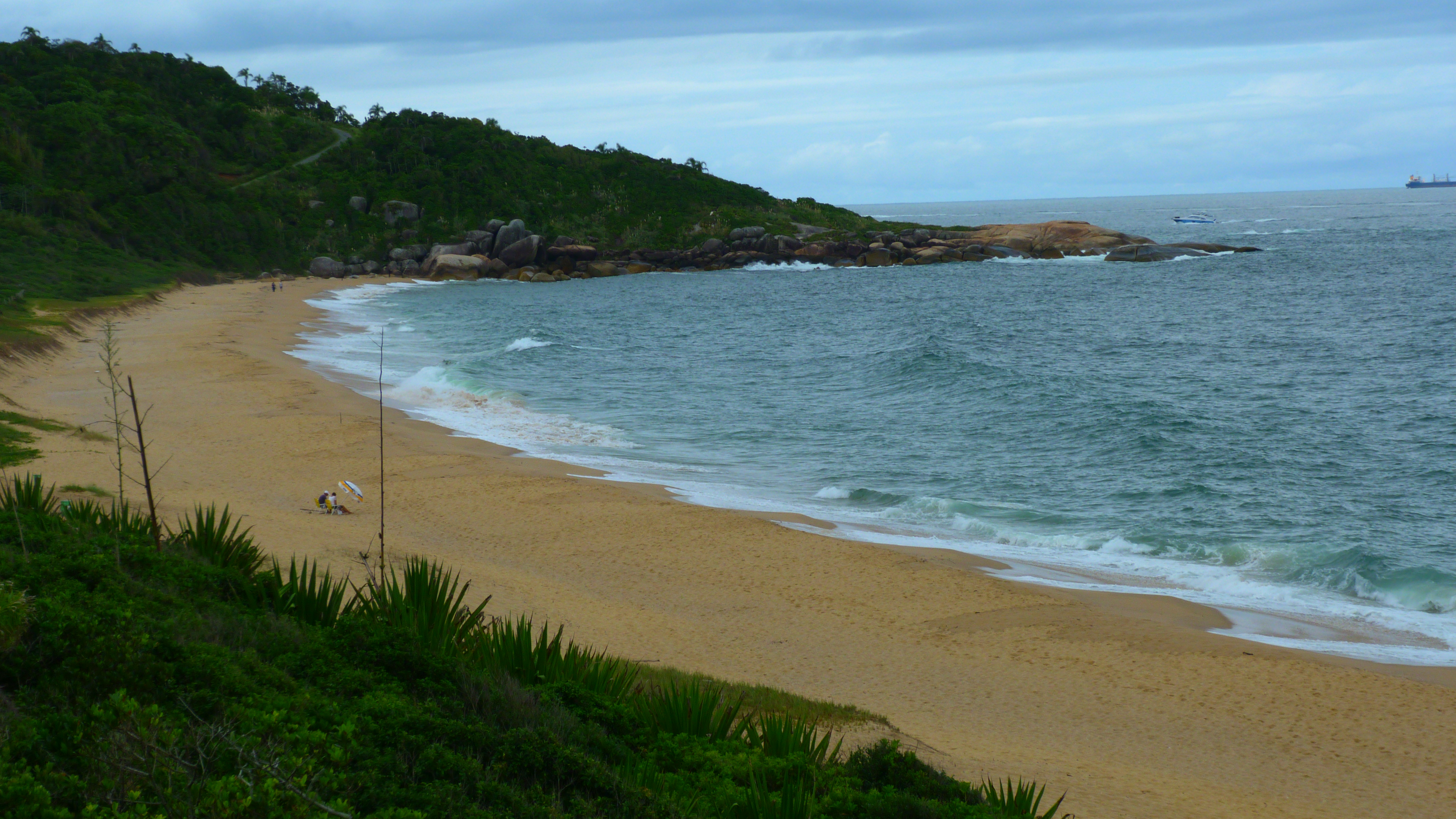 Vista da praia de Taquarinhas.